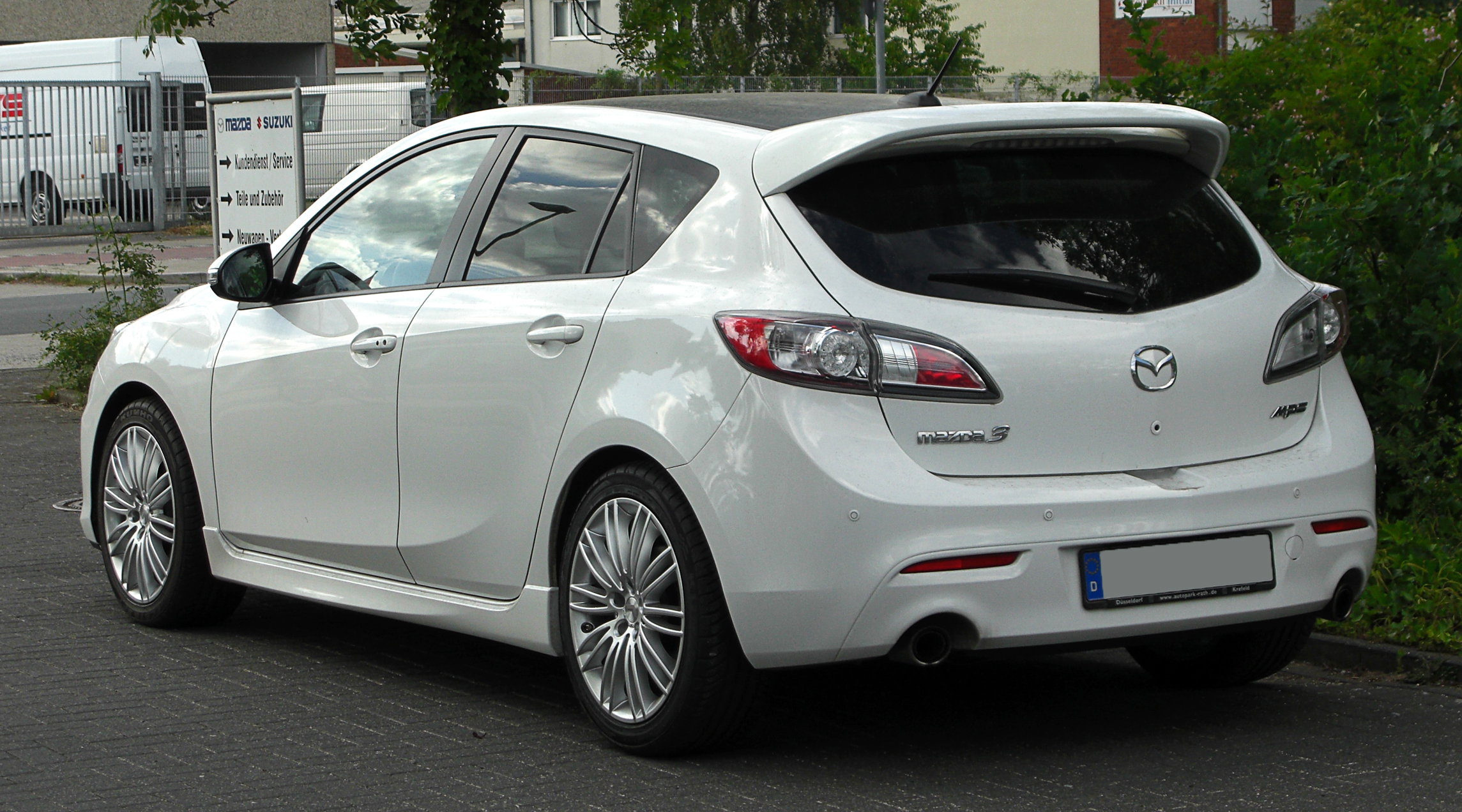 Mazda3 MPS (BL)